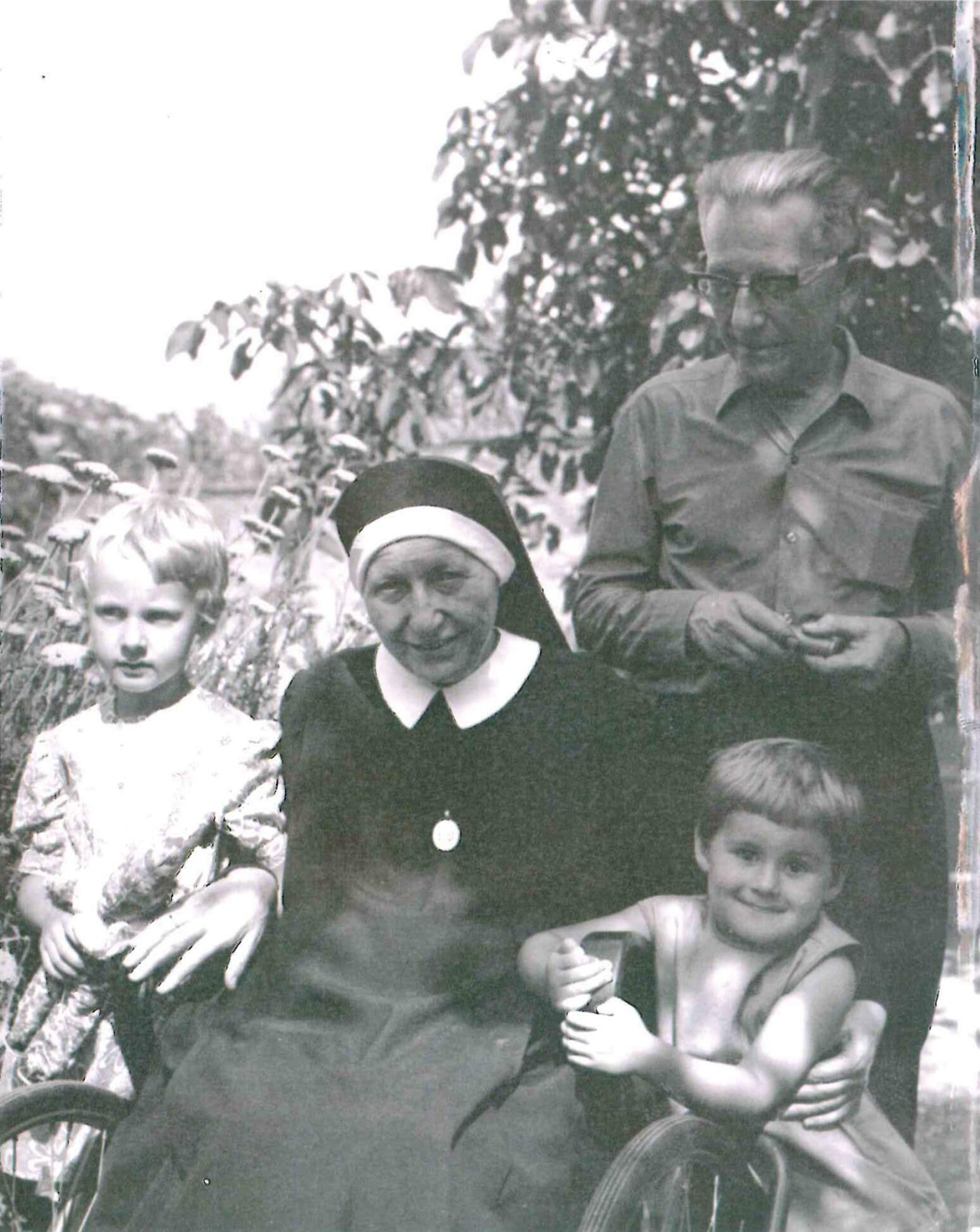 Žofie Bohumila Langrová s bratrem ing. Jaroslavem Langrem a jeho vnoučaty na zahradě kláštera v Hradišti u Znojma behěm léta 1971?2